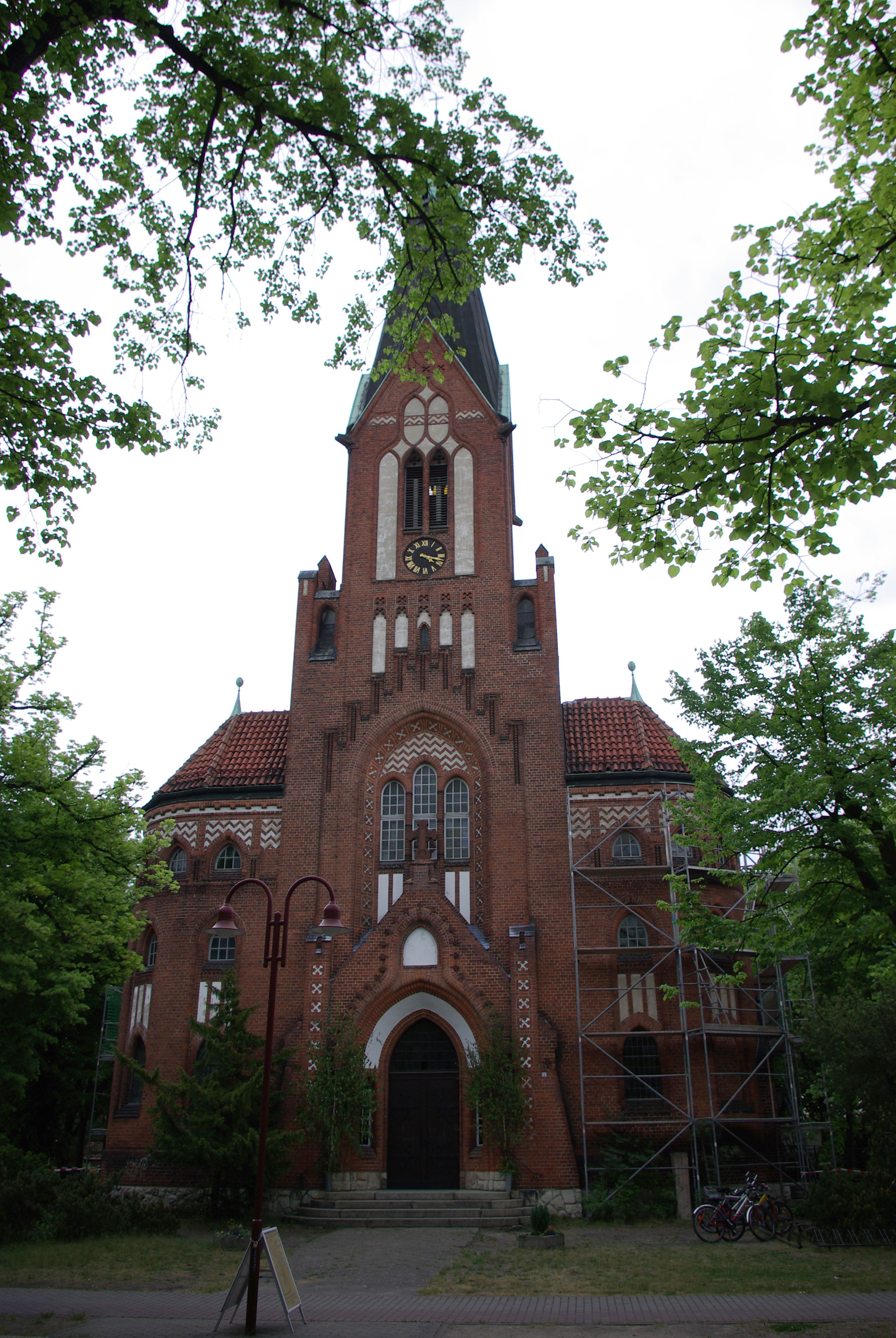 Eichwalde, Brandenburg, Deutschland, die Kirche am Händelplatz, die Kirche steht auf der Denkmalliste, Geotags in Exif-Daten